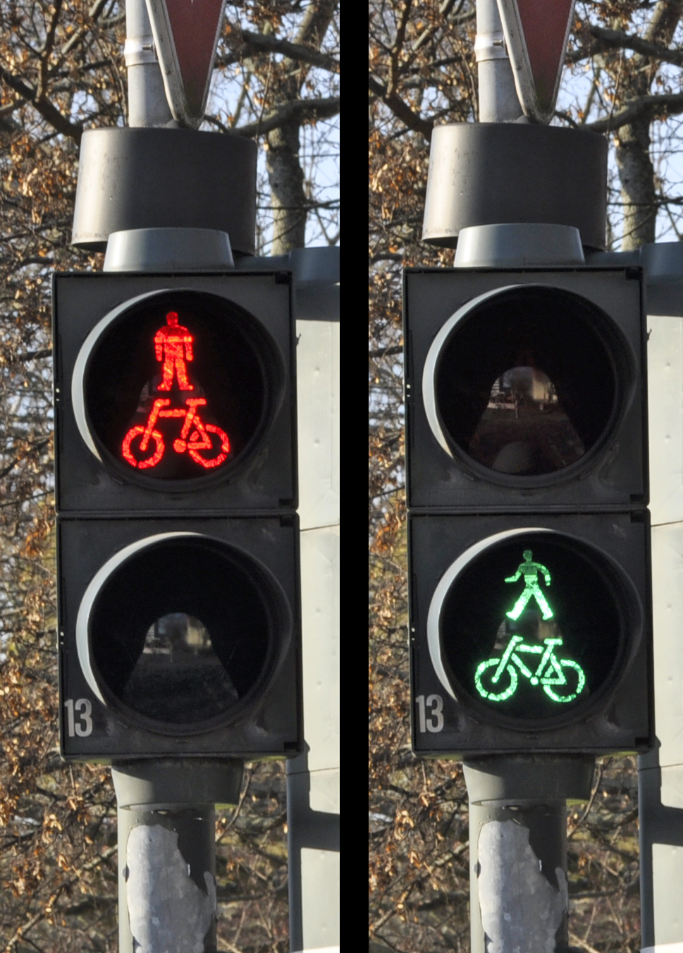 Fußgänger/Fahrradampel, Göttingen, Kreuzbergring/Waldweg, 31.12.2013. Fotos: Francisco Welter-Schultes.